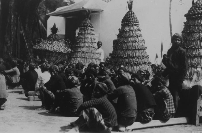 foto. Groep Javanen bijeen rond de Garebeg z.g. "spijsbergen" die worden geofferd in de moskee op het terrein van de Kraton van de Sultan van Jogjakarta